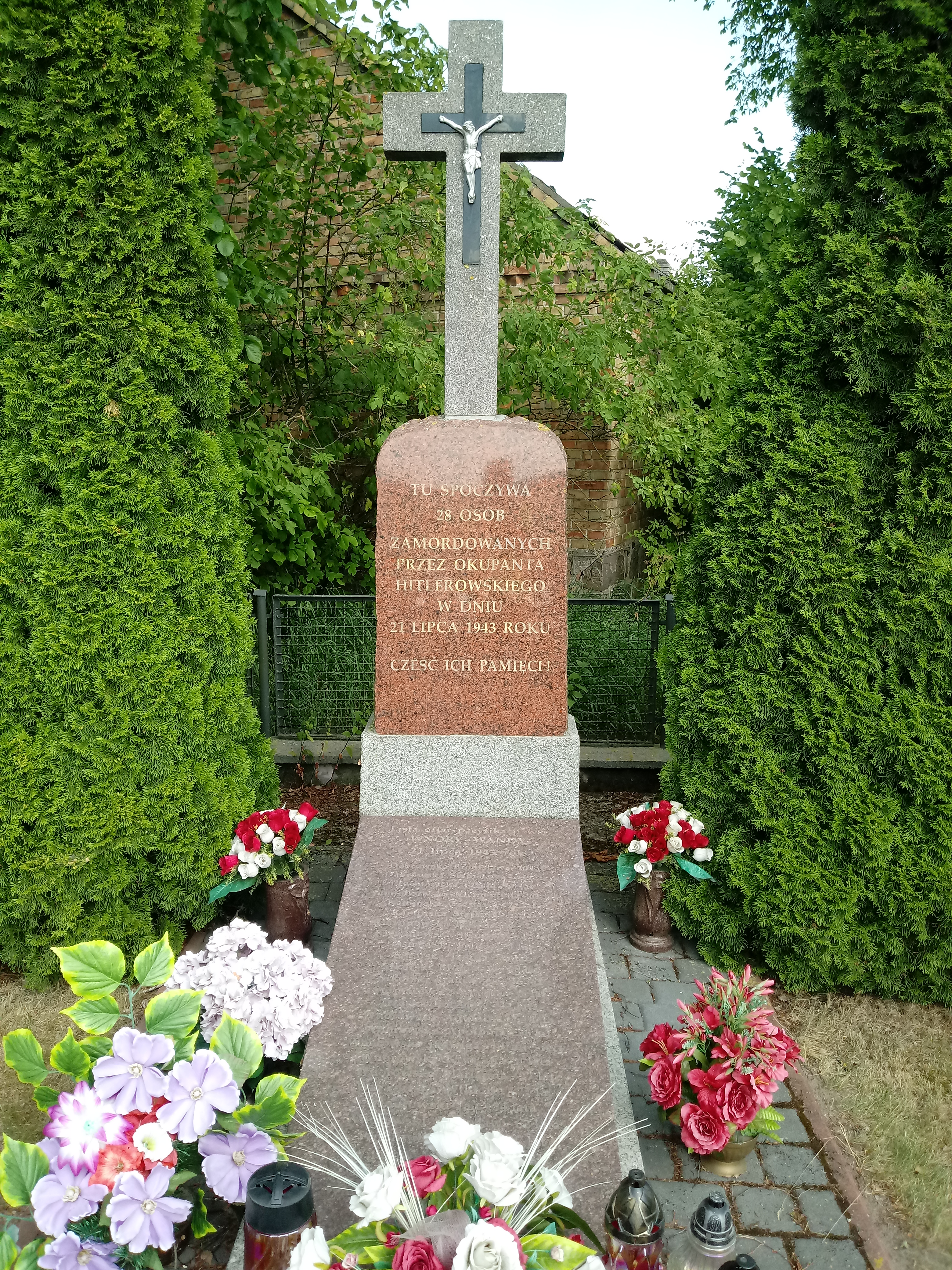 Krzyż, zbiorowa mogiła w miejscu kaźni i całkowicie spalonej wsi 21 lipca 1943 roku.